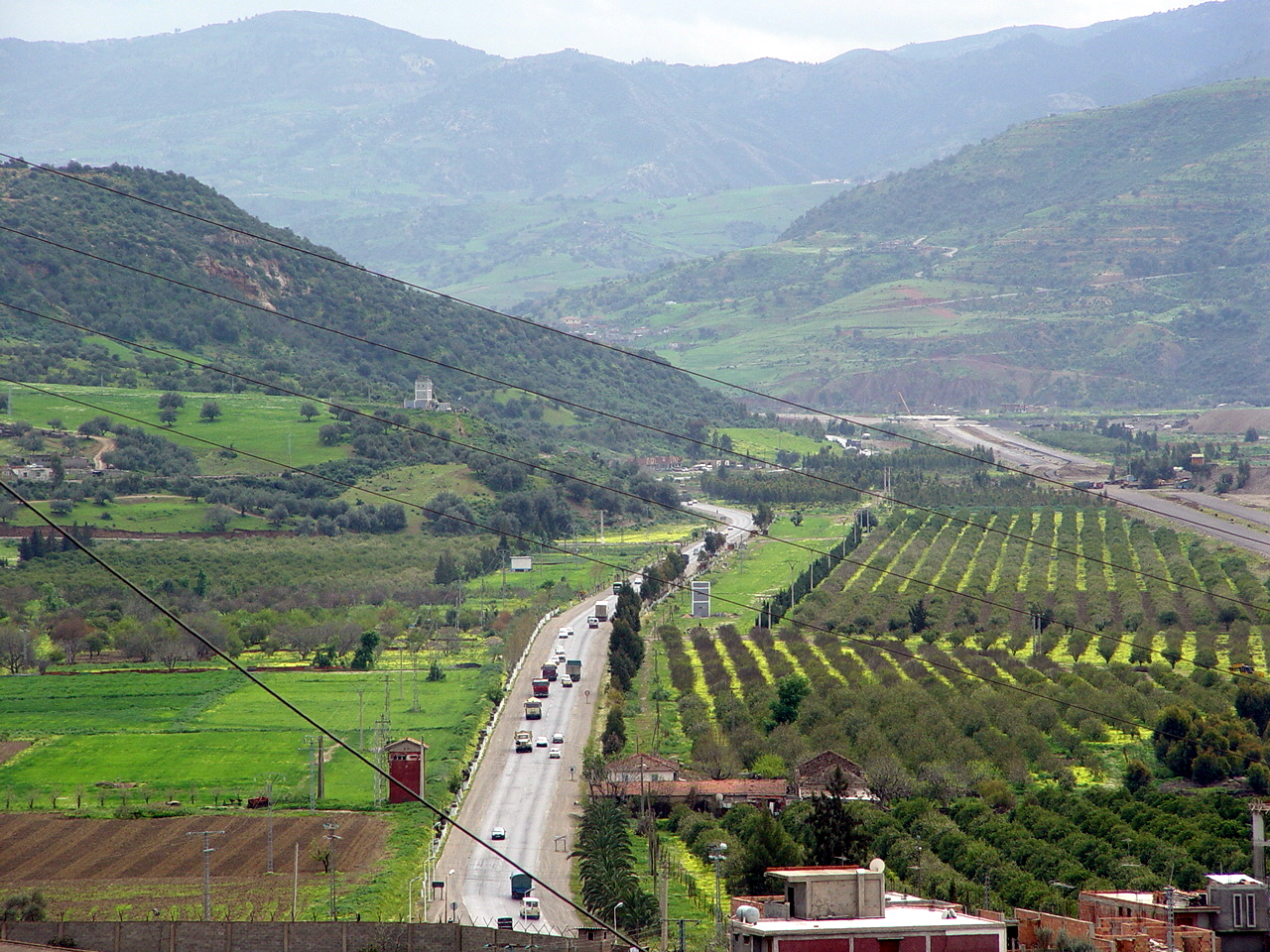 Les orangers d'Elmorhania à Kediria (wilaya de Bouira, Algérie).